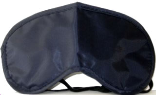 Sleep Mask